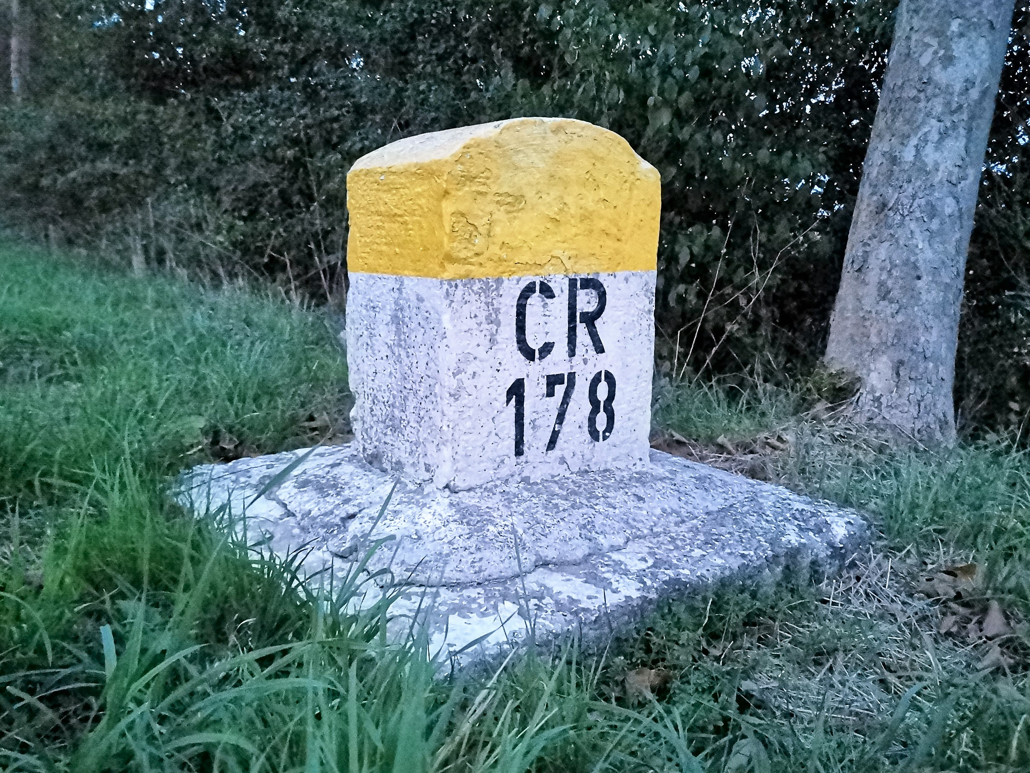 Borne kilométrique CR178 entre Schléiwenhaff et Cessange.